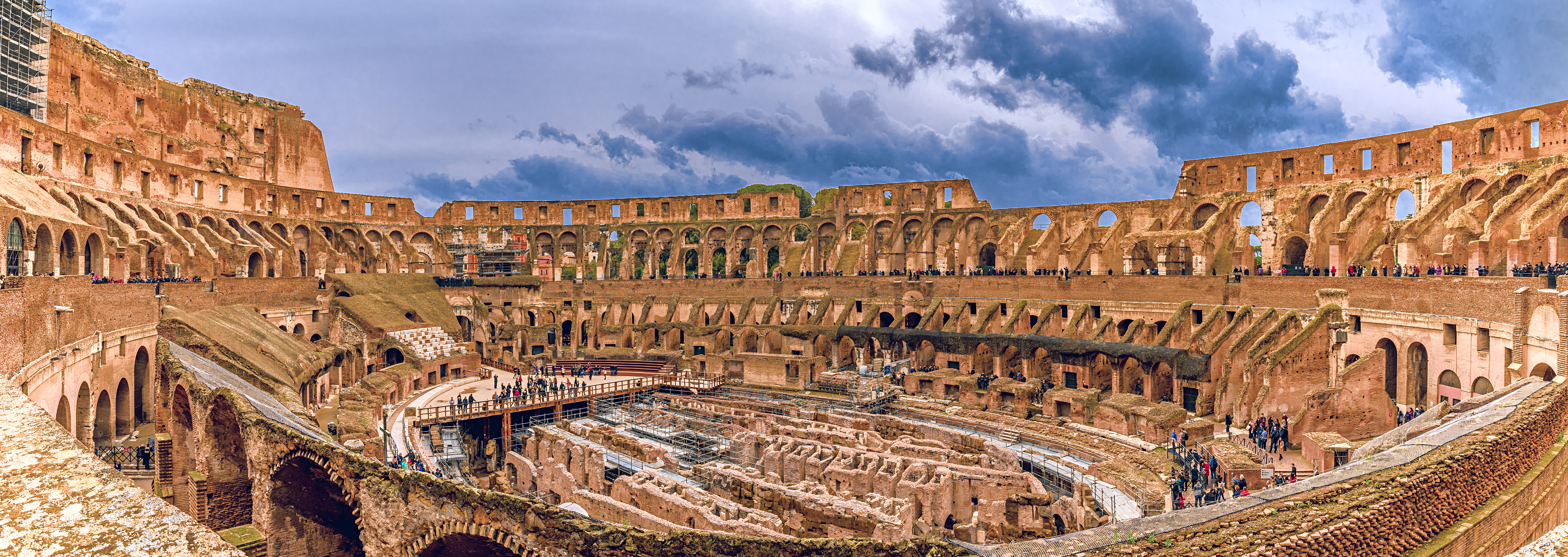 Das Kolosseum in Rom im Panoramablick mit Blick auf die moderne Rekonstruktion des Arenabodens von Nordwesten im November 2019 aufgenommen.